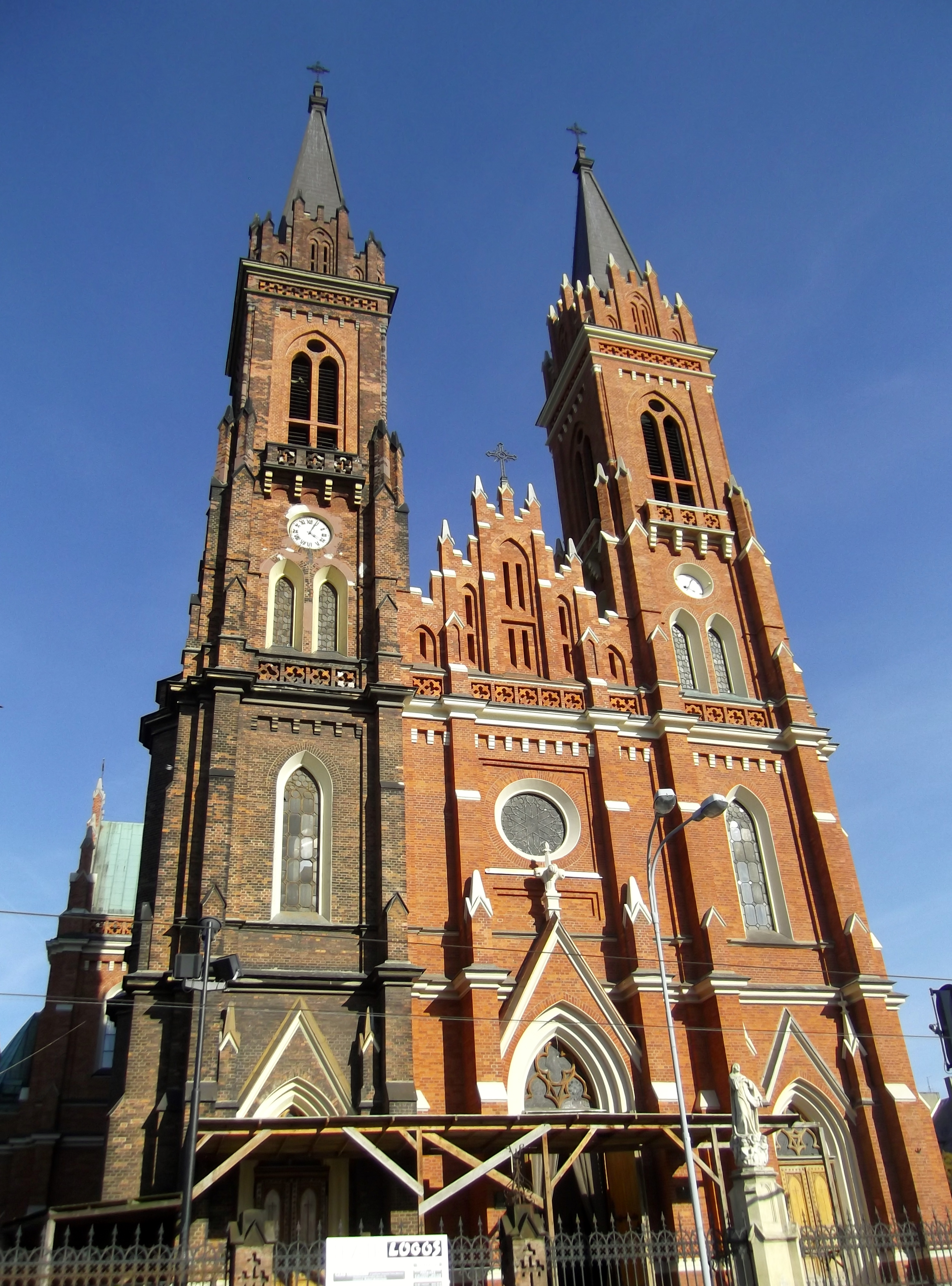 Łódź, kościół Wniebowzięcia NMP, 1882–1892